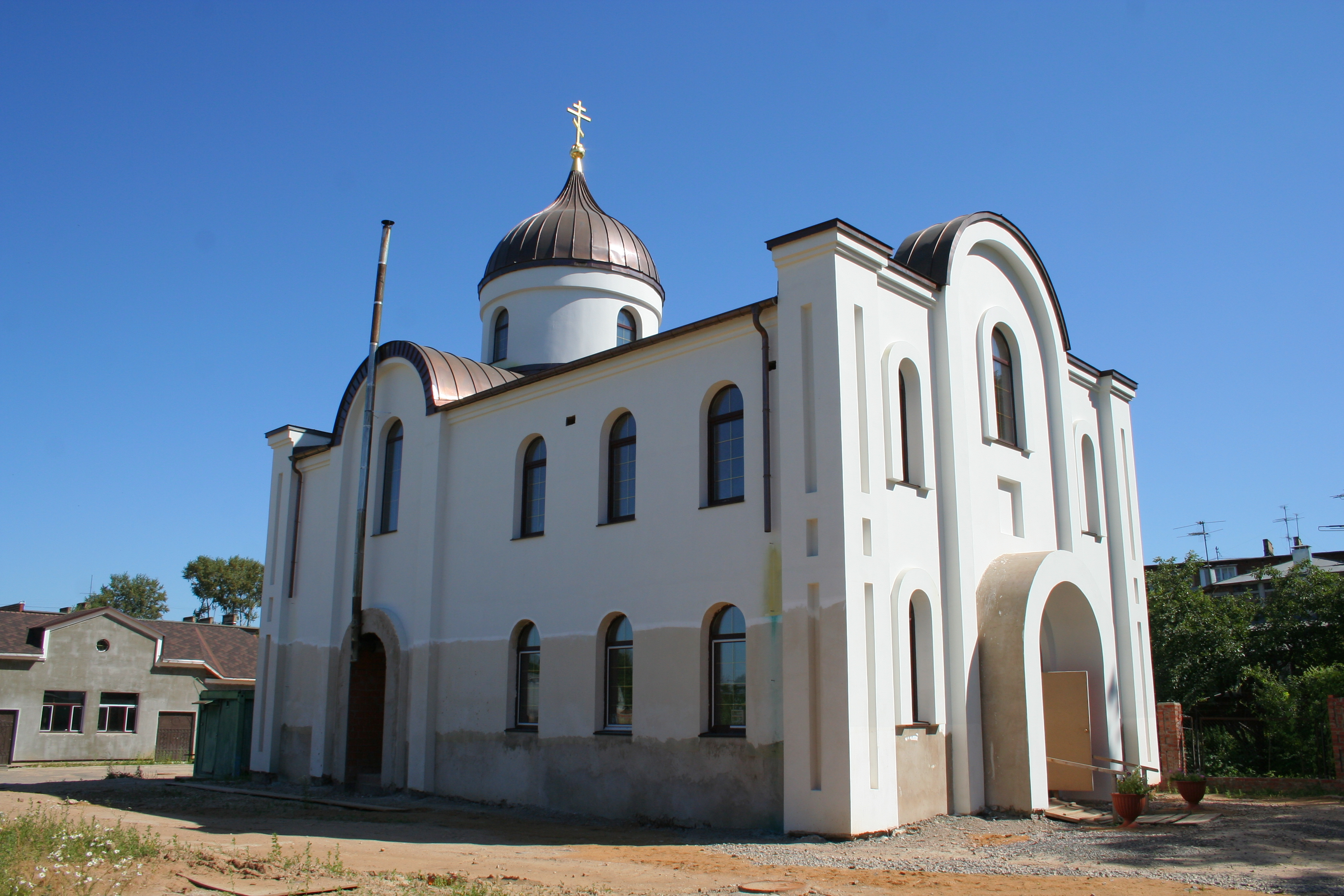 Kirche des St. Pantaleon in der Siedlung Lwowski, Oblast Moskau, Russland.